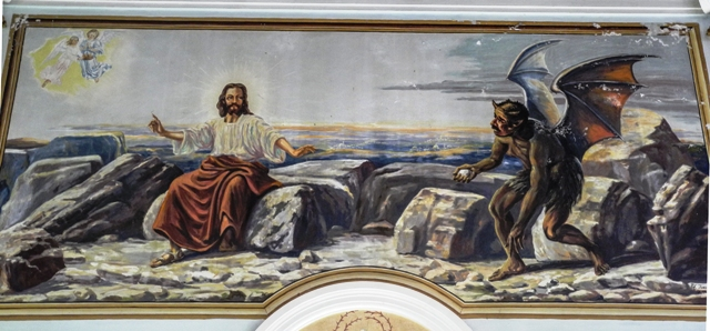 Photograph of painting on the walls of the San Rafael del Norte catholic church.